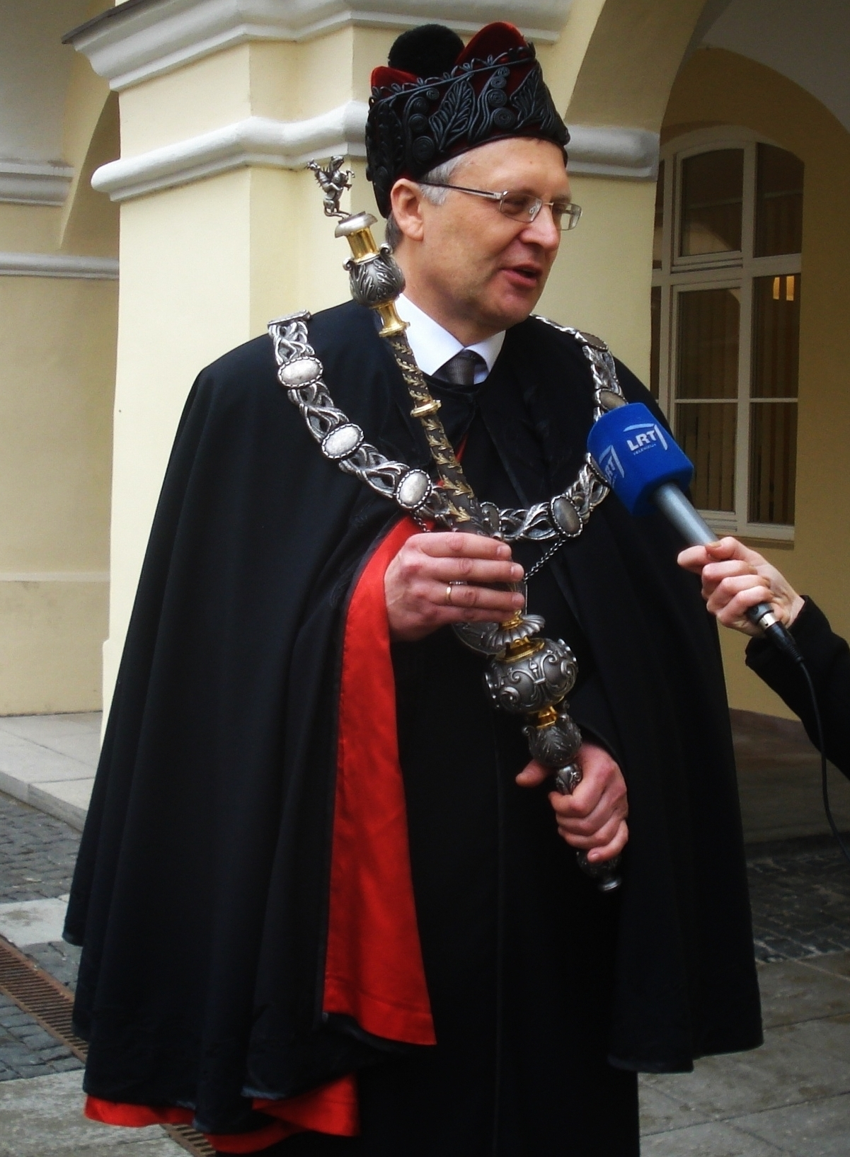 Артурас Жукаускас (р. 1956), литовский физик, член Академии наук Литвы, ректор Вильнюсского университета (с 2015 года)